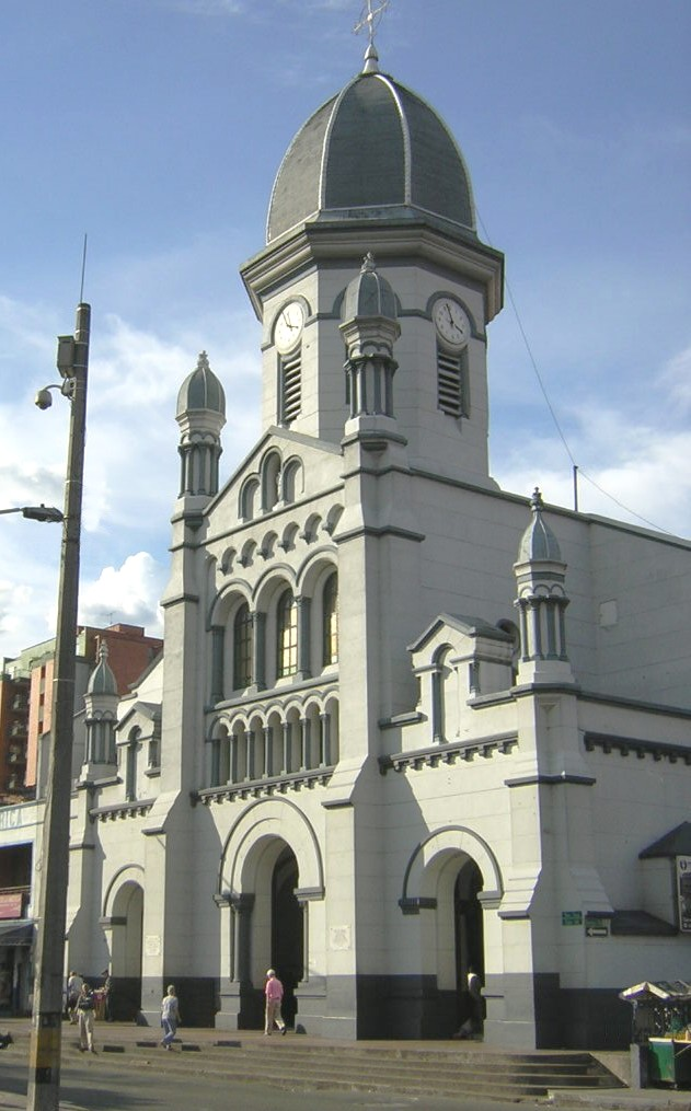 Iglesia De Nuestra Señora de los Dolores, Barrio Ámerica, Medellín, Colombia